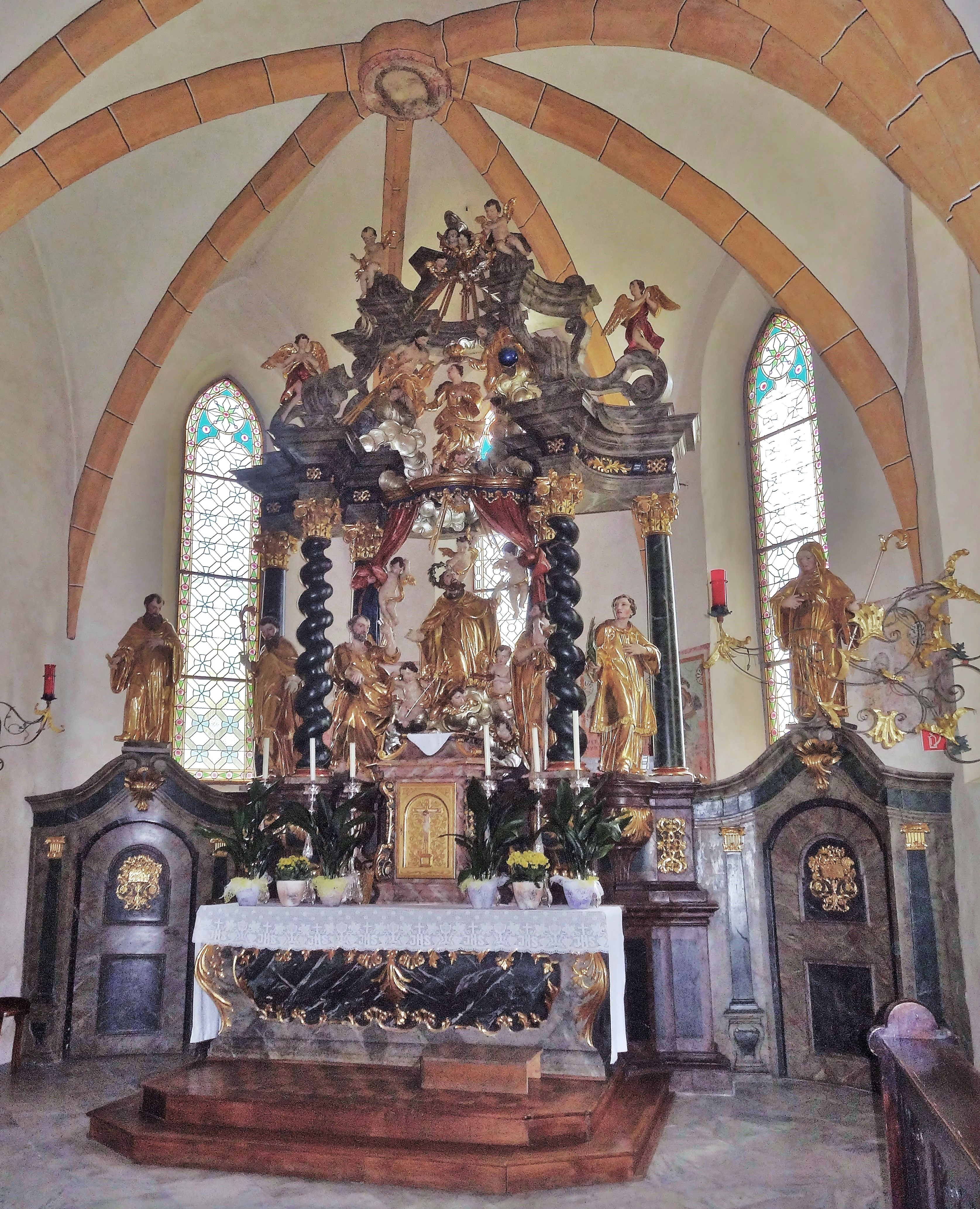 Kath. Pfarrkirche Hll. Hermagoras und Fortunatus (Hermagor], der Hochaltar